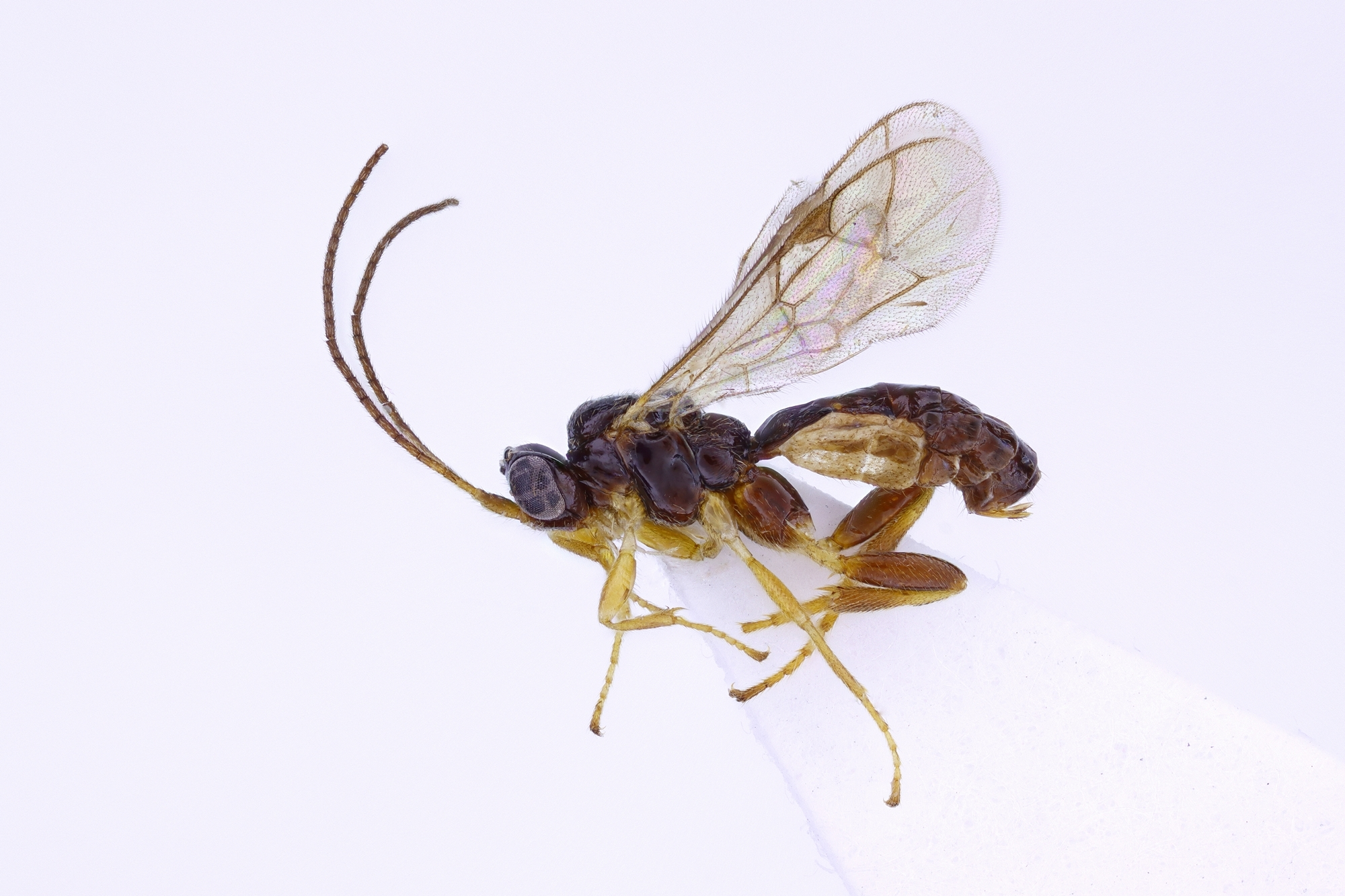 Schlupfwespe der Art Orthocentrus panguana Zwakhals, 2015 (Orthocentrinae) aus Peru (Dept. Huánuco, Panguana). Publikation: Mitt. Münchner Ennt. Ges. 105, 65-78, 2015.